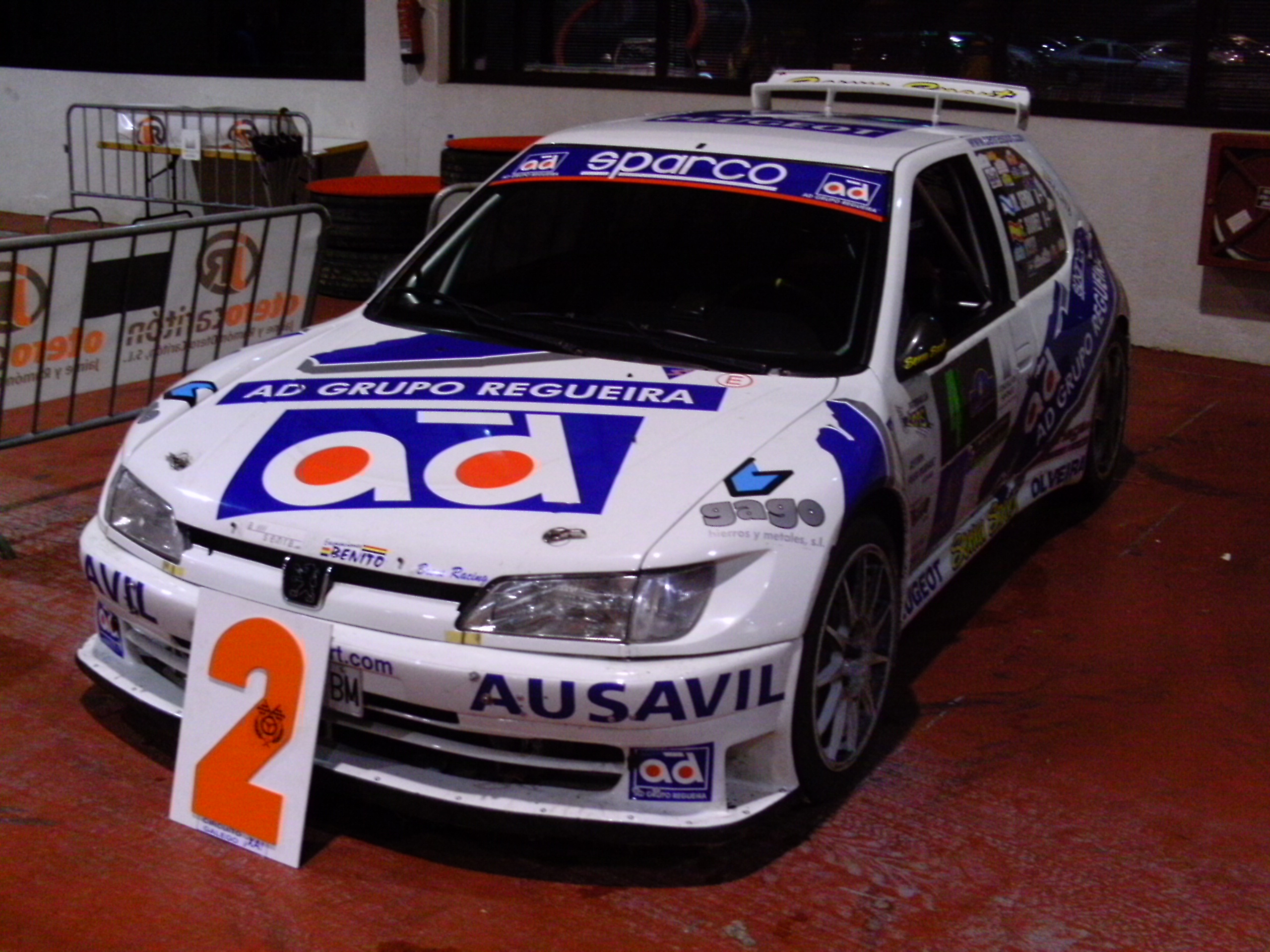 Peugeot 306 Kit Car de Manuel Senra, en Rali Botafumeiro 2009